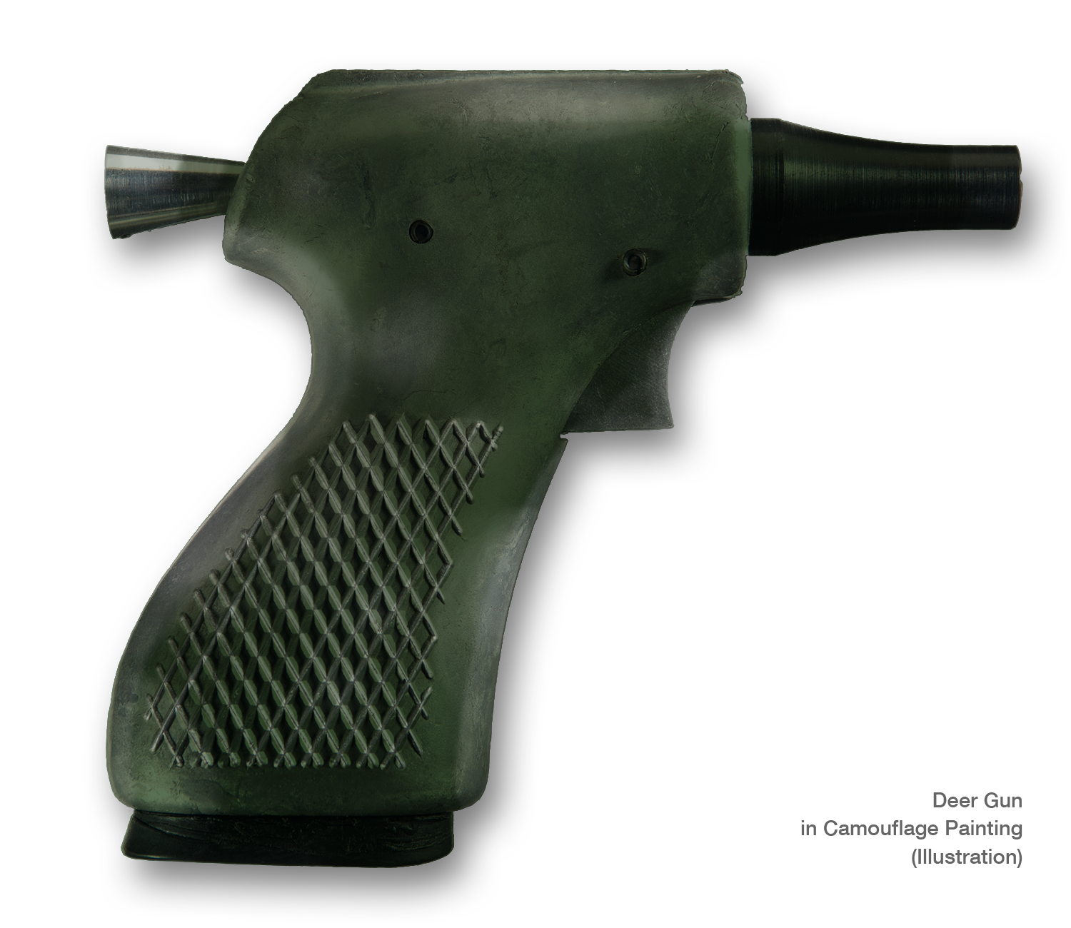 Illustration einer Amerikanischen "Deer Gun" Pistole in Einsatzlackierung" (während des Vietnamkrieg von der CIA eingesetzt)